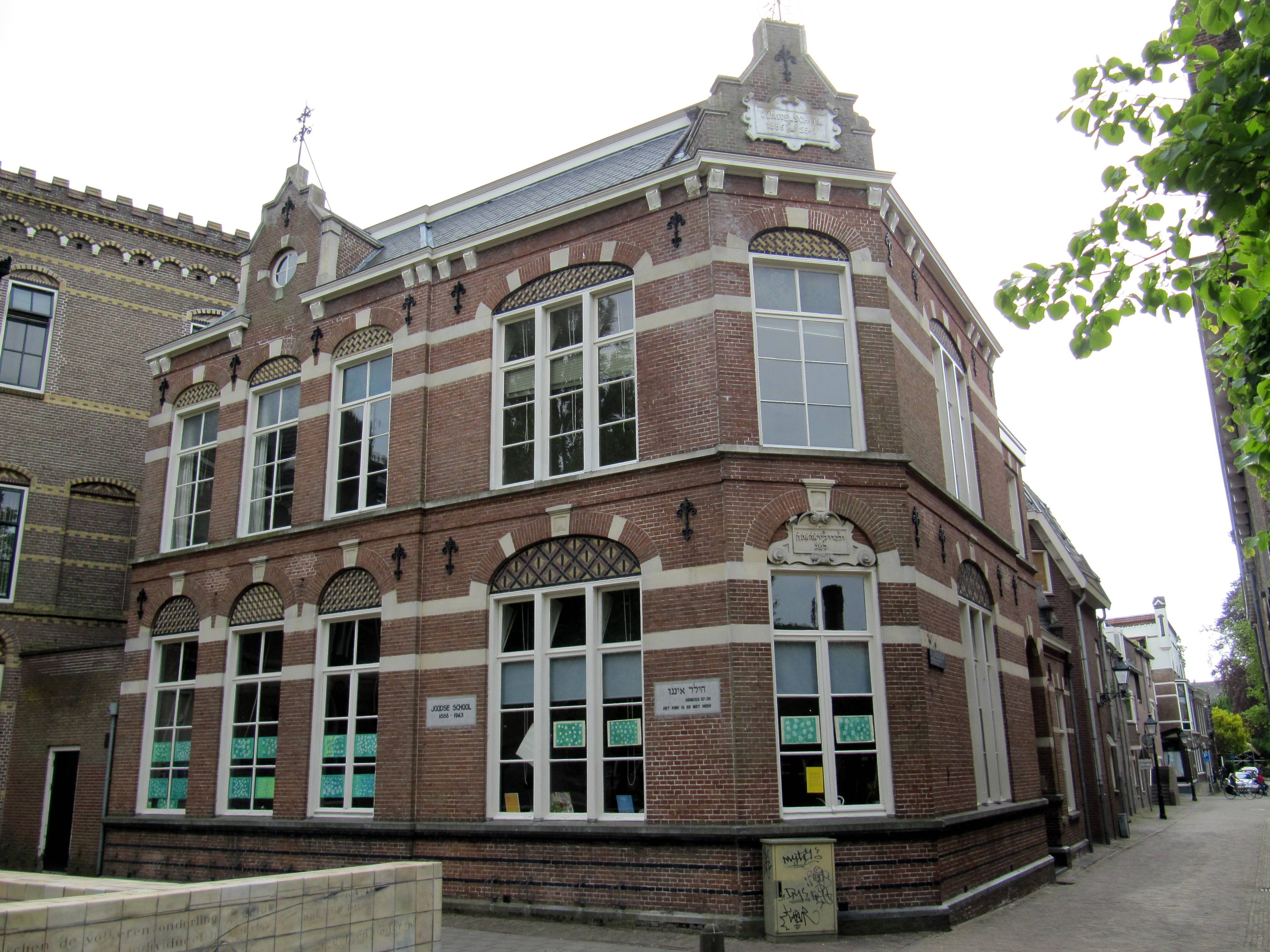 SCHOOL VAN BASISONDERWIJS VOOR JOODSE KINDEREN, in 1886 naar ontwerp van architect Herman Rudolf Stoett in een decoratieve neo-renaissance-stijl.